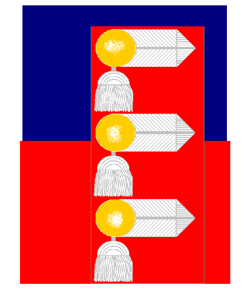 Ärmelaufschläge der Schweizergarde der Kurhessischen Armee